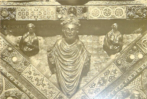 Rainald von Dassel - Portrait auf dem Reliquienschrein im Kölner Dom.